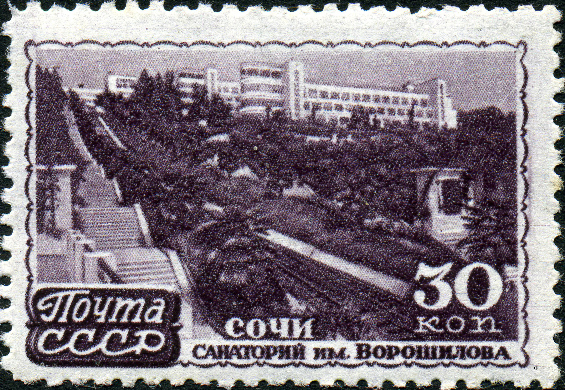 Марка СССР